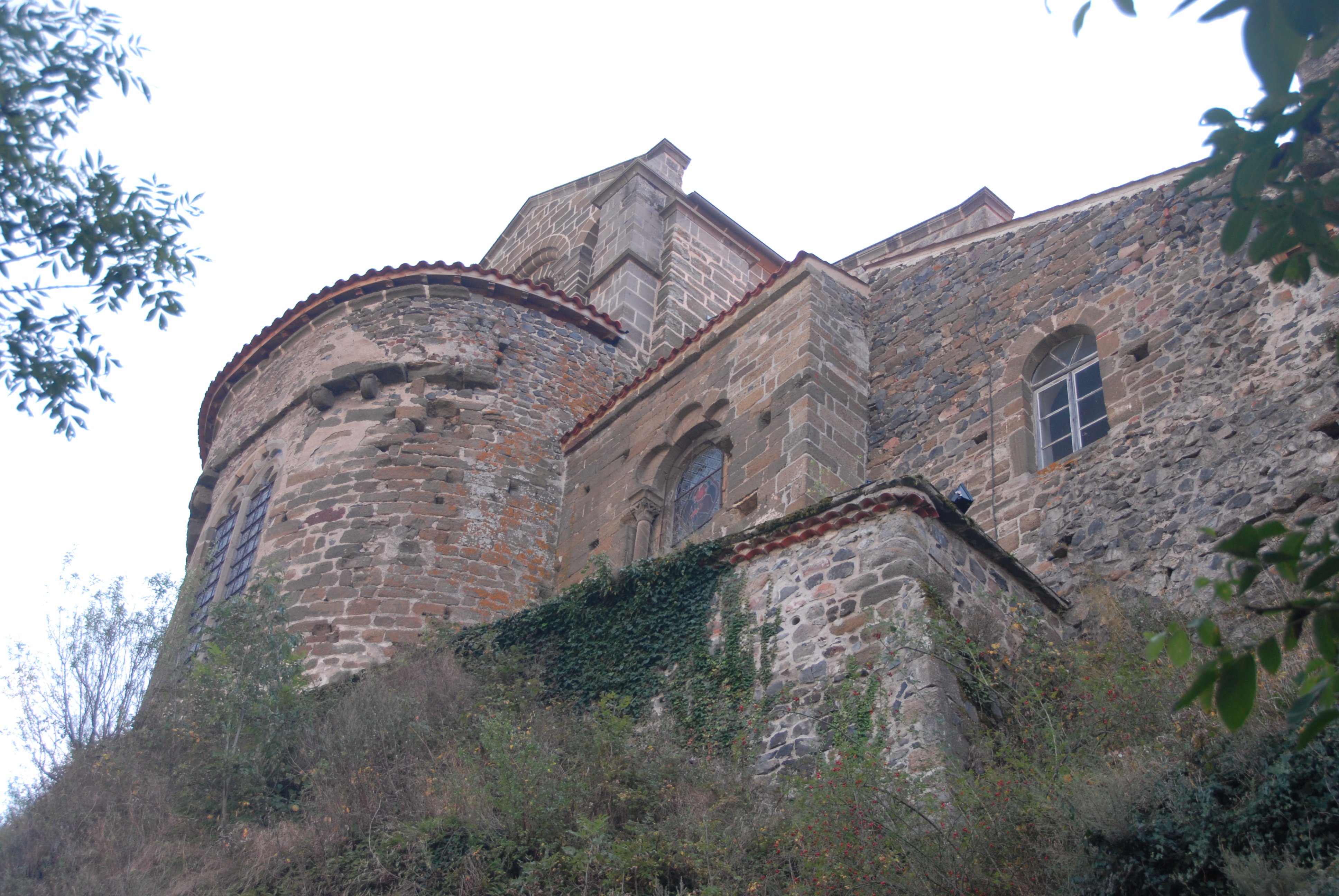 Chanteuges, Chorhaupt der Kirche